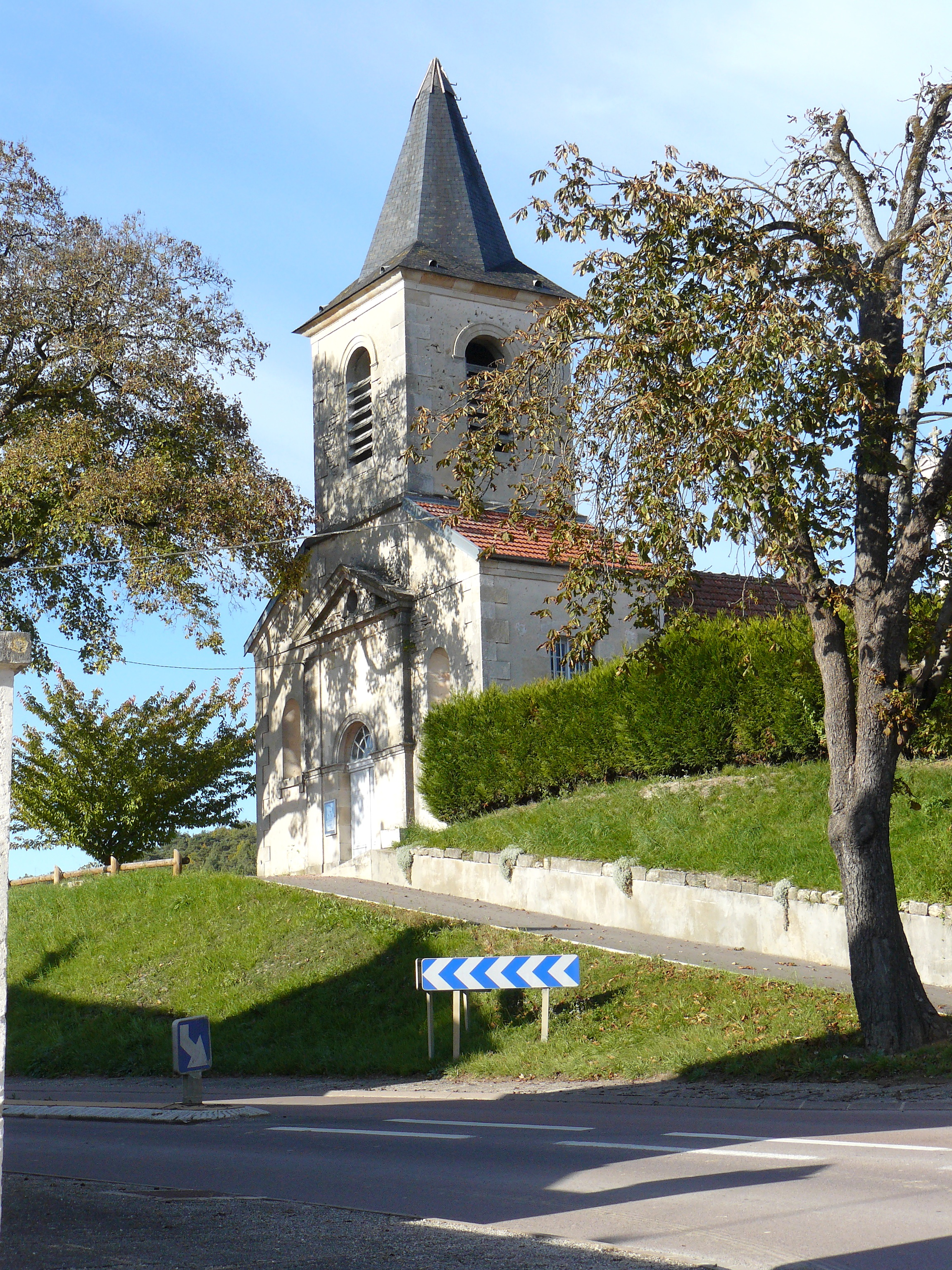 Commune de Villers-Patras (Côte-d'Or, France), l'église du village.